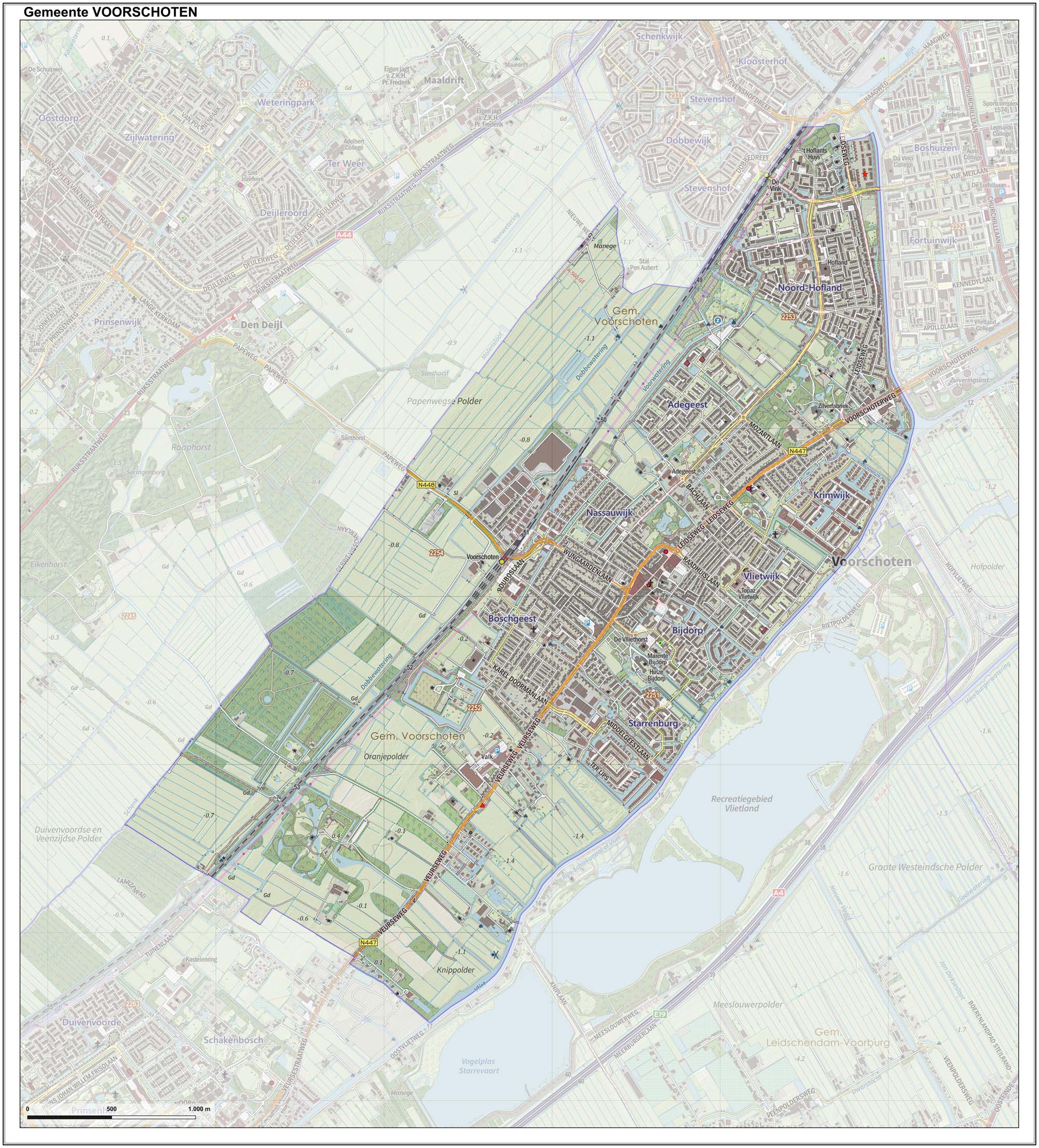 Topografische gemeentekaart. Resolutie: 400 pixels/km. Kaartbeeld samengesteld uit de open geodata van de Top10NL en Top25namen (Kadaster), Creative Commons-BY licentie. Gebouwvlakken uit open geodata BAG extract. Wegen uit de OpenStreetMap, OpenStreetMap community. Reliëfschaduw uit de Actuele Hoogtekaart AHN2. Samenstelling en kleurenschema: Jan-Willem van Aalst, met QGIS. Zie ook de Legenda.